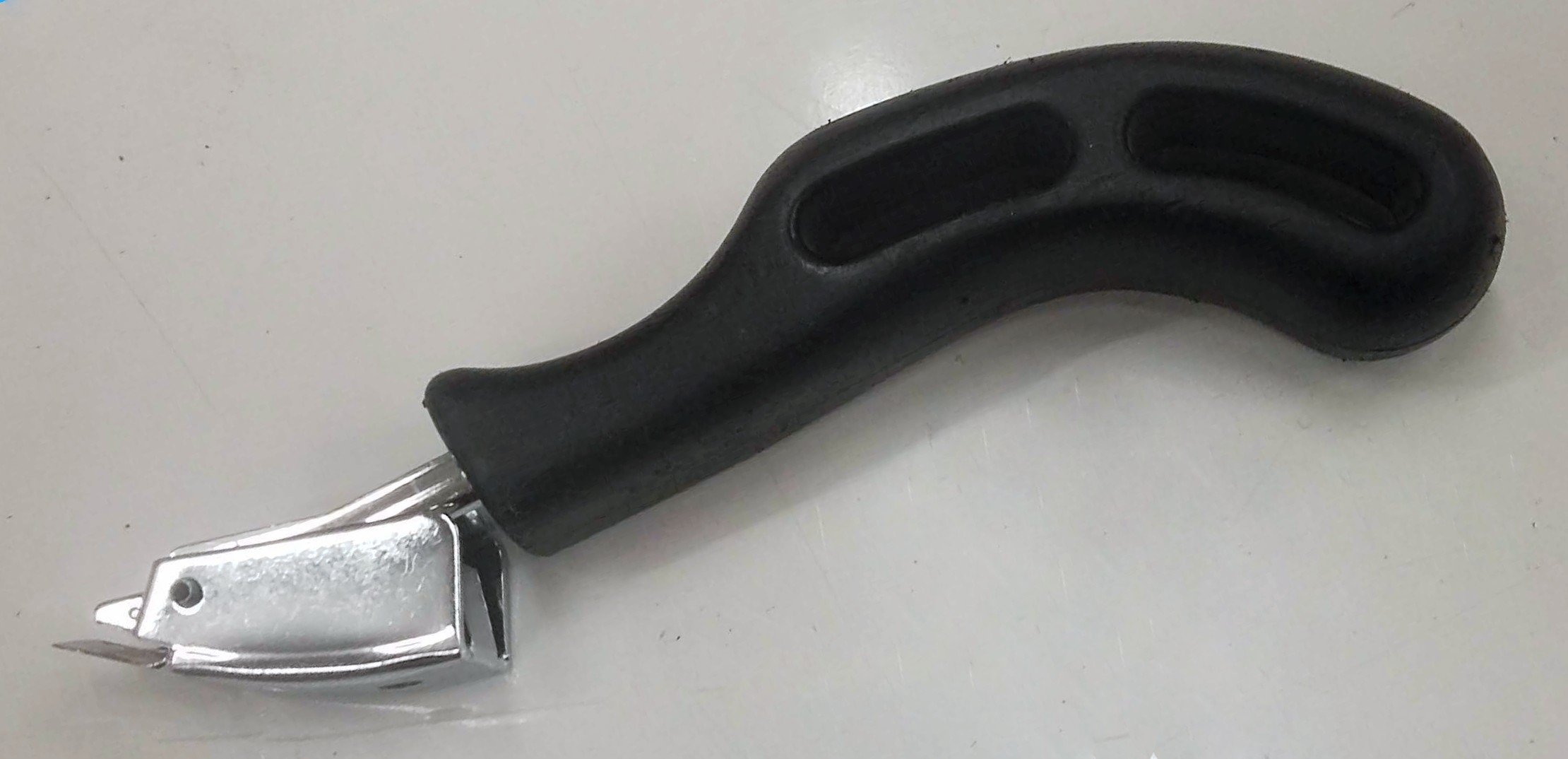 Arrache-agrafe